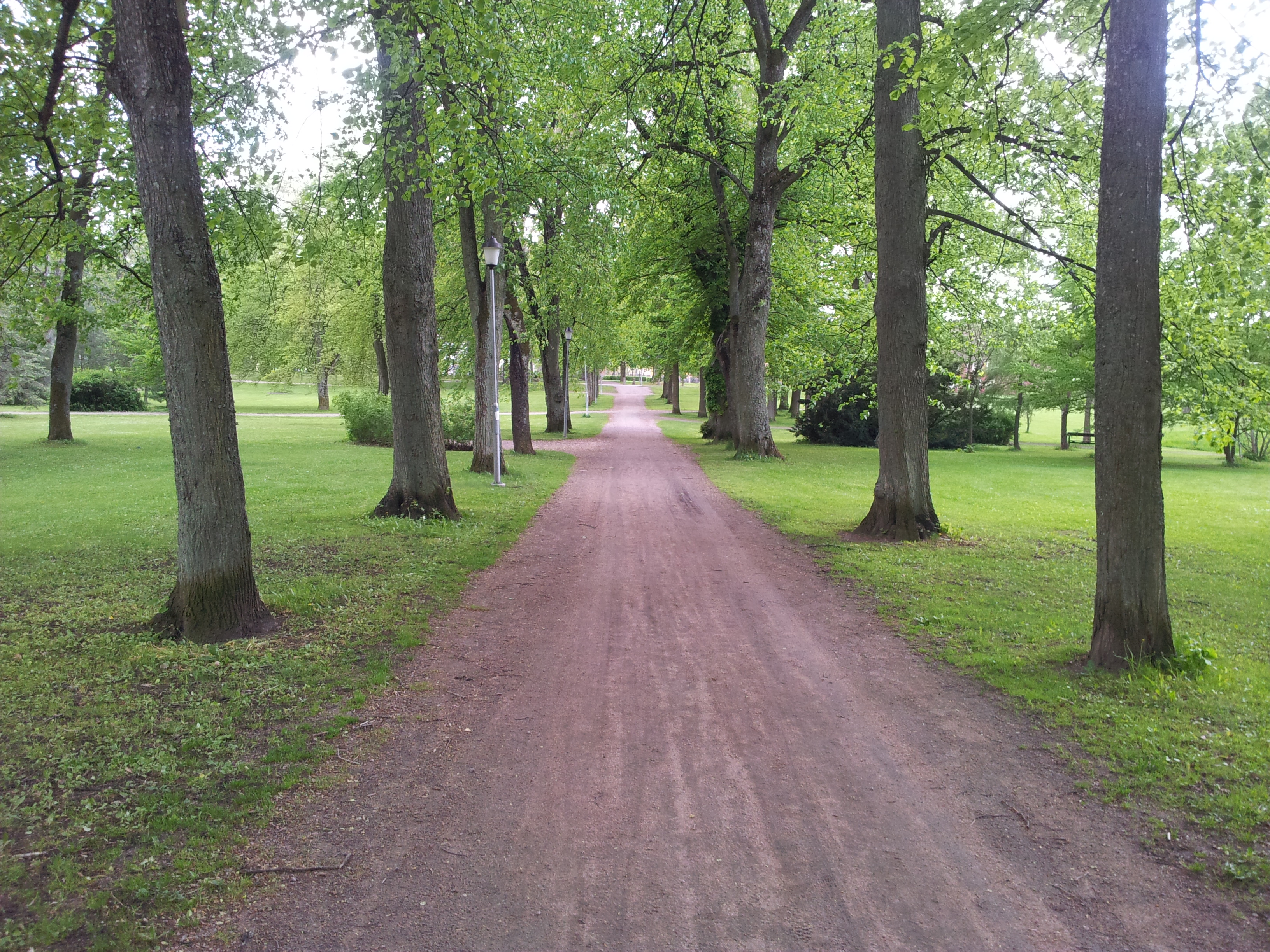 Skara Botan